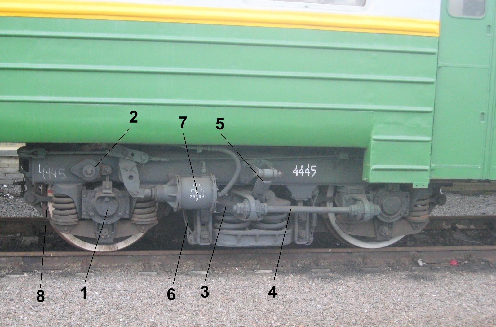 Тележка моторного вагона электропоезда ЭР2-1034